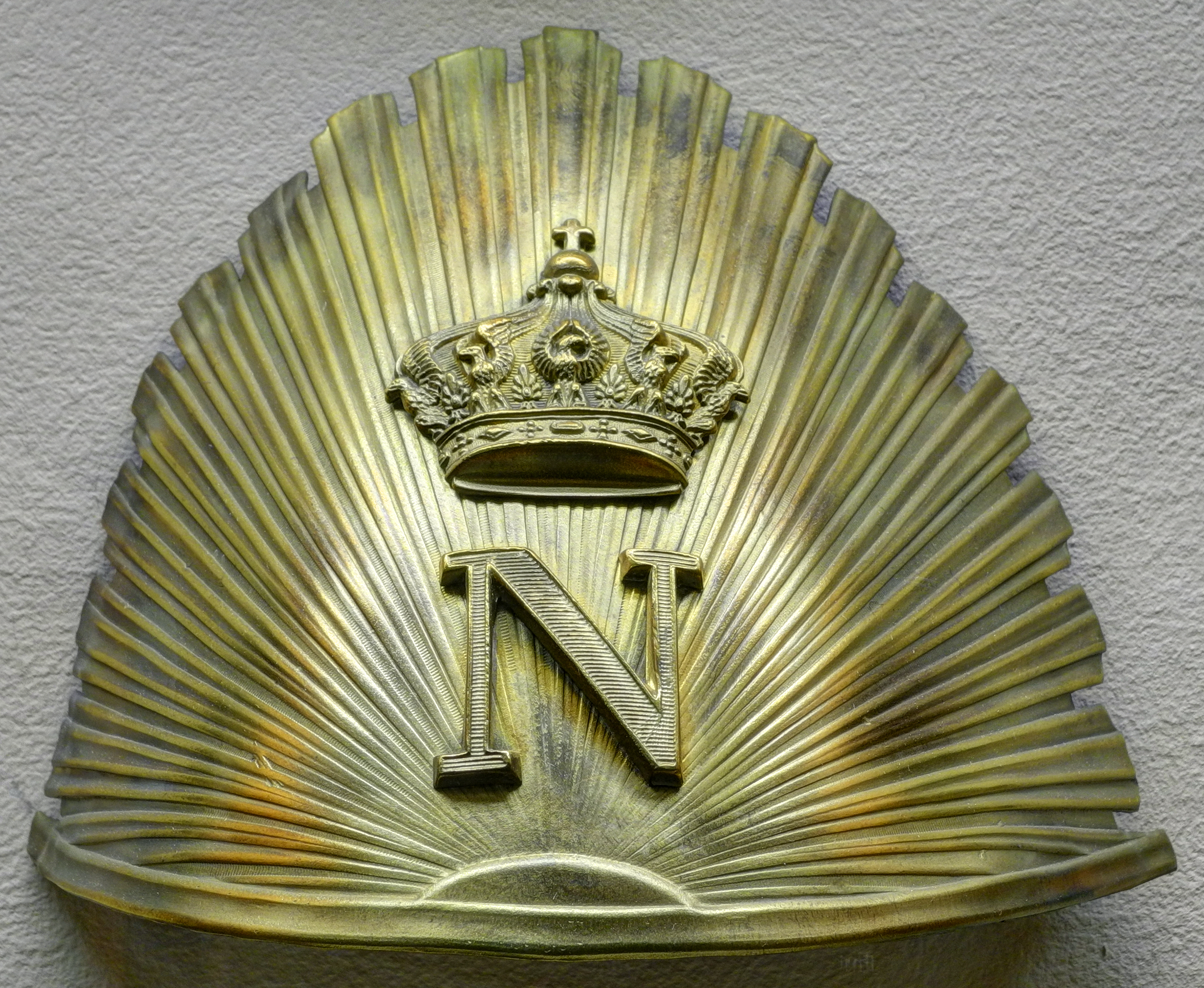 Musée d'Histoire : Plaque de shapska de lancier de la garde impériale (HDR). France, 1856 - 1870 CO 1539